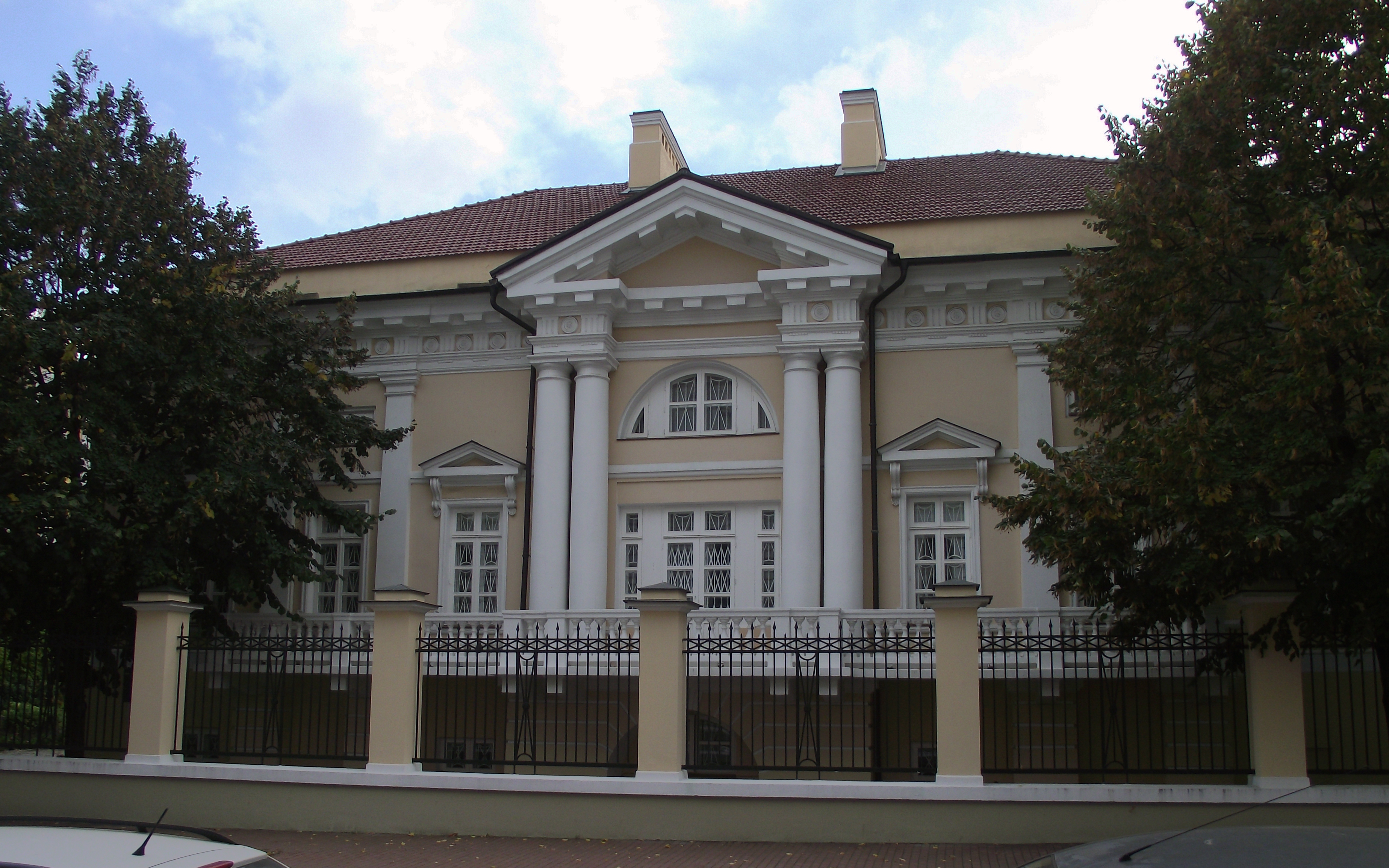 1808 р. Побудований ювеліром Самсоном Стрельбицьким. Були тут аптека і лікарня. Зараз - резиденція посла США в Україні.